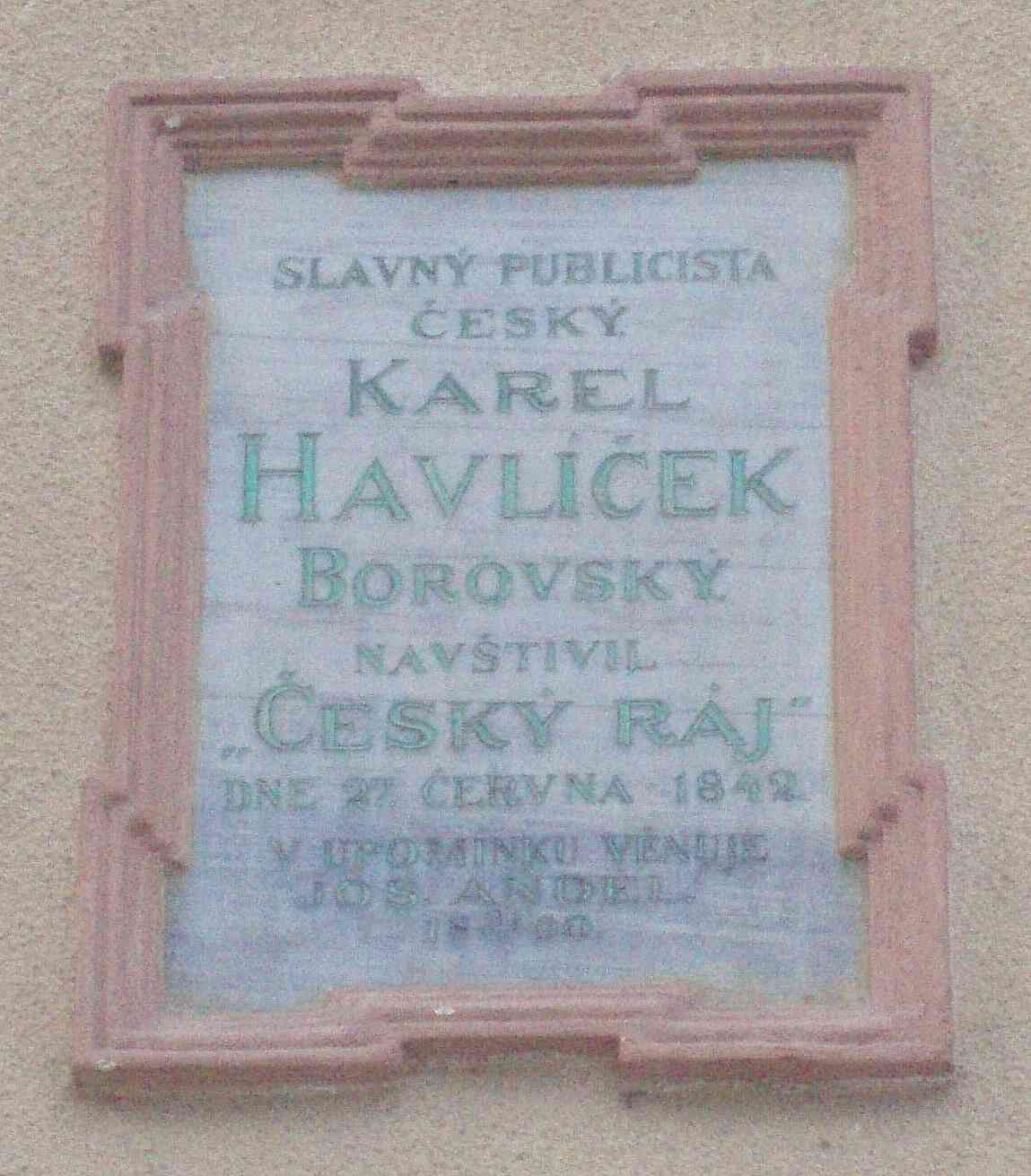 Tafel für Borovský in Sedmihorky